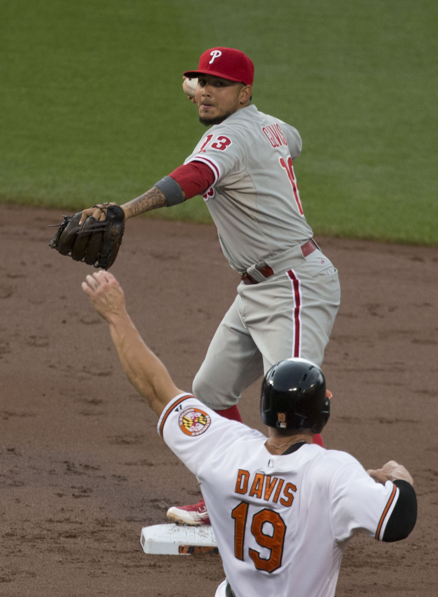 Phillies at Orioles 6/15/15